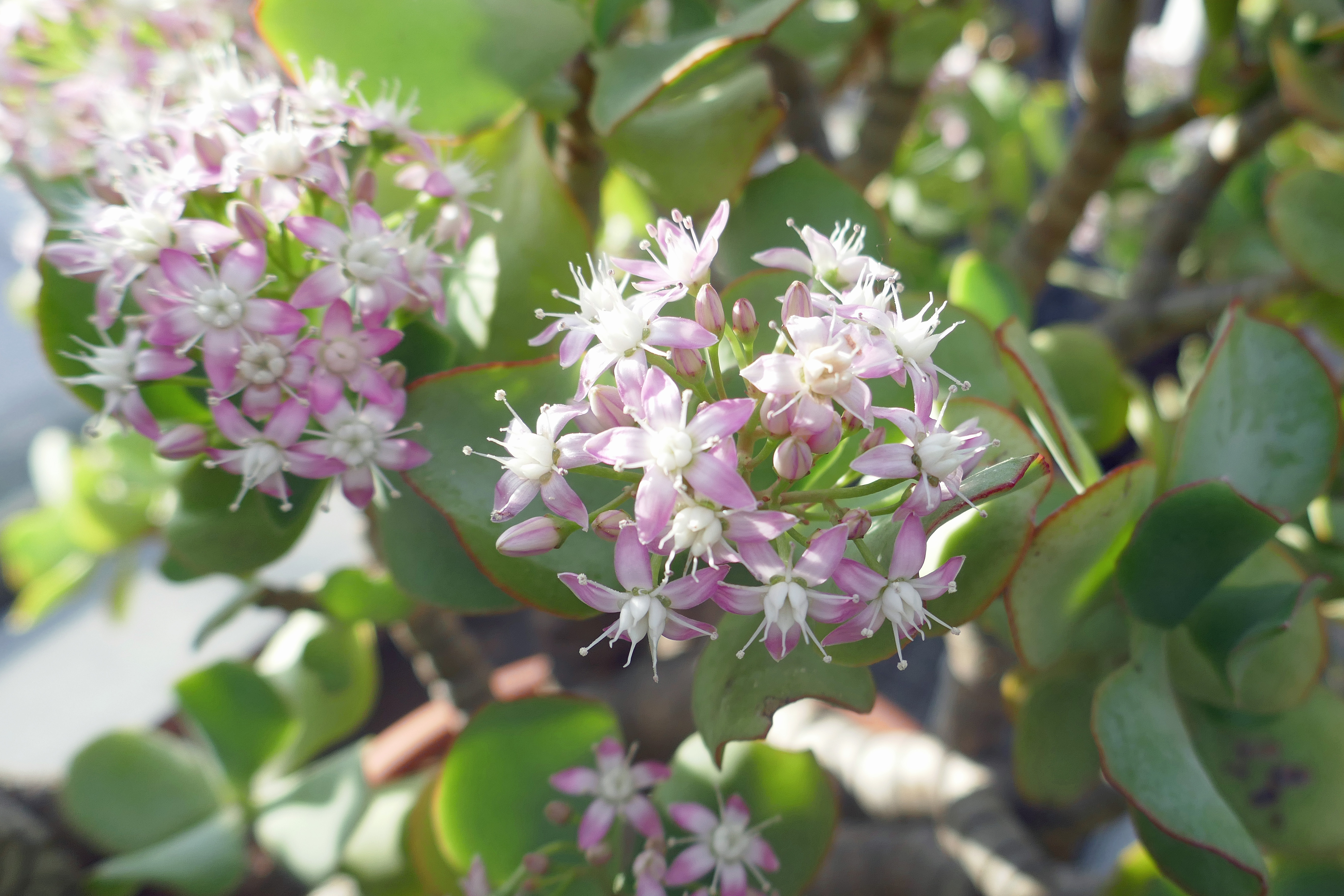 Crassula arborescens subsp. undulatifolia. Afrique du Sud, province du Cap-Oriental. Jardin botanique de Berlin.